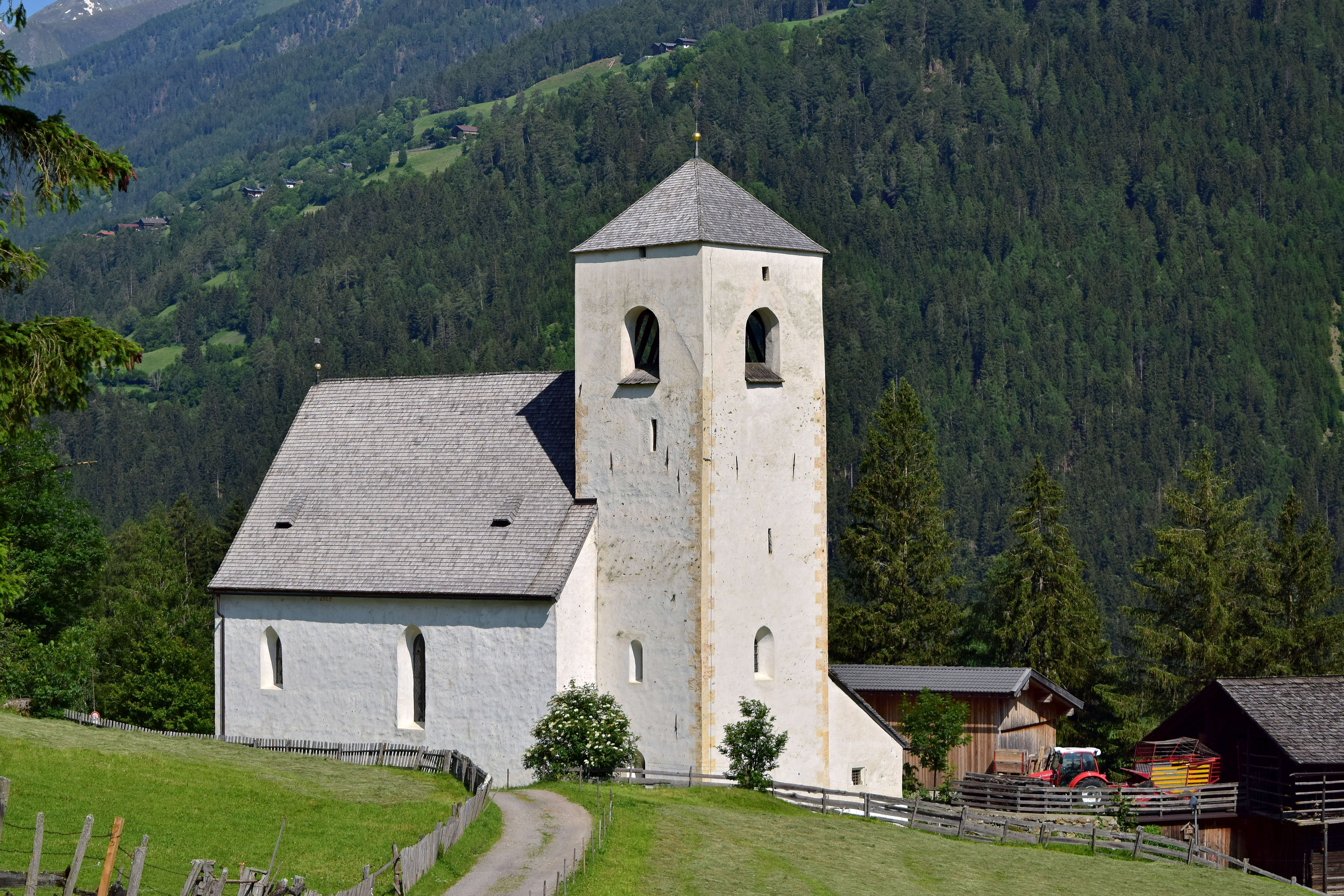 Kath. Filialkirche St. Nikolauskirche in Ganz in der Gemeinde Matrei in Osttirol.